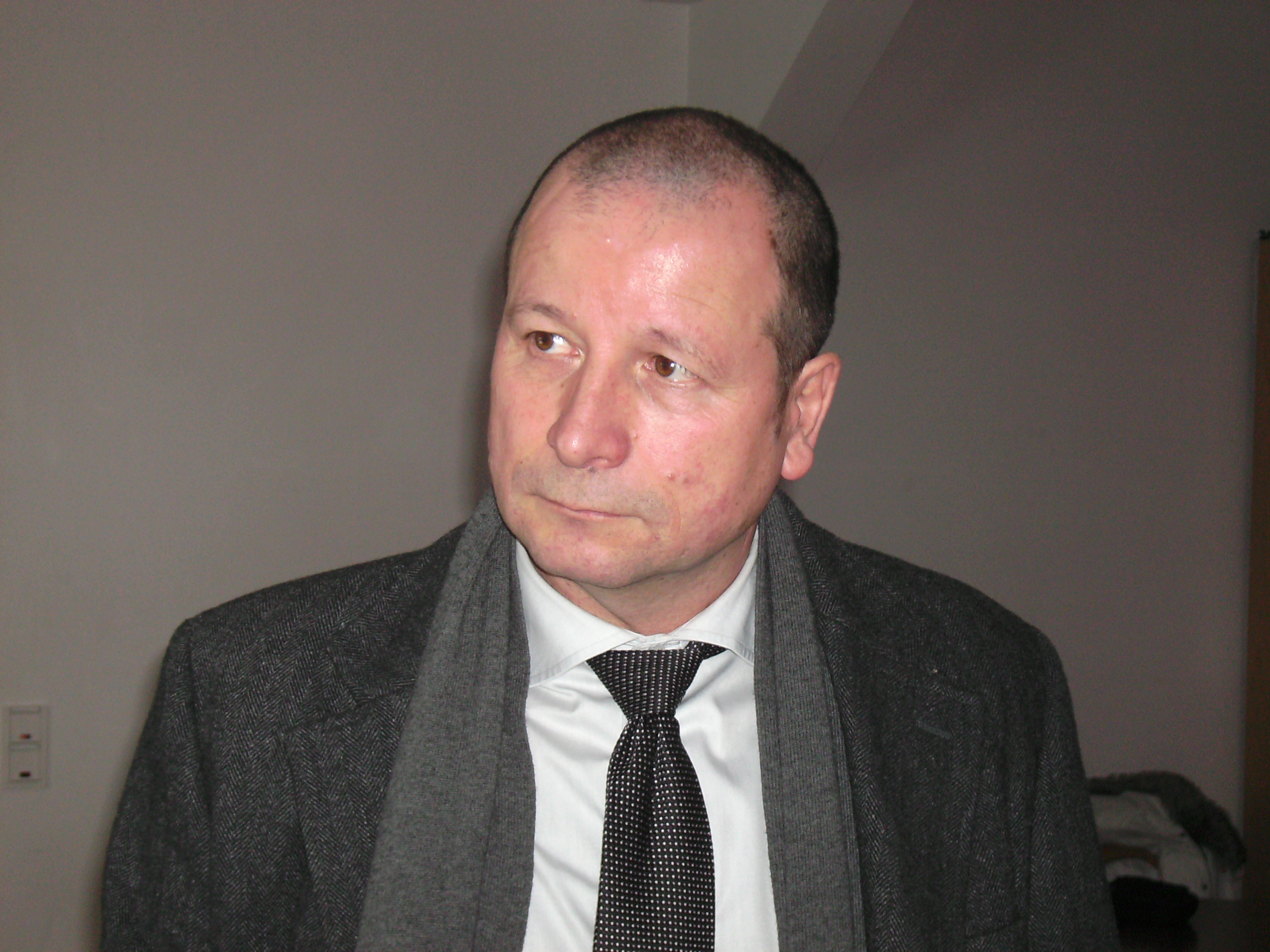 Portrait Klaus Borger